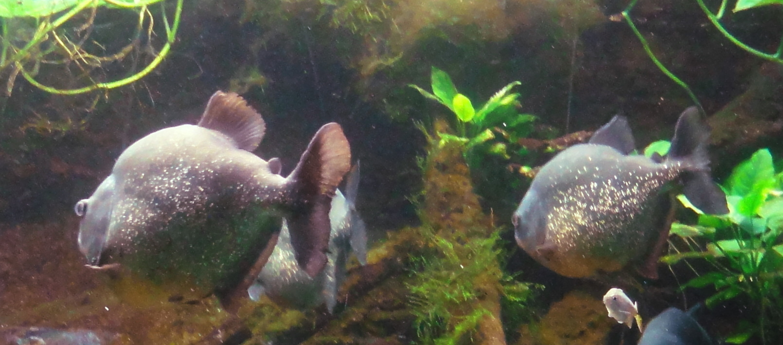 Pygocentrus piraya